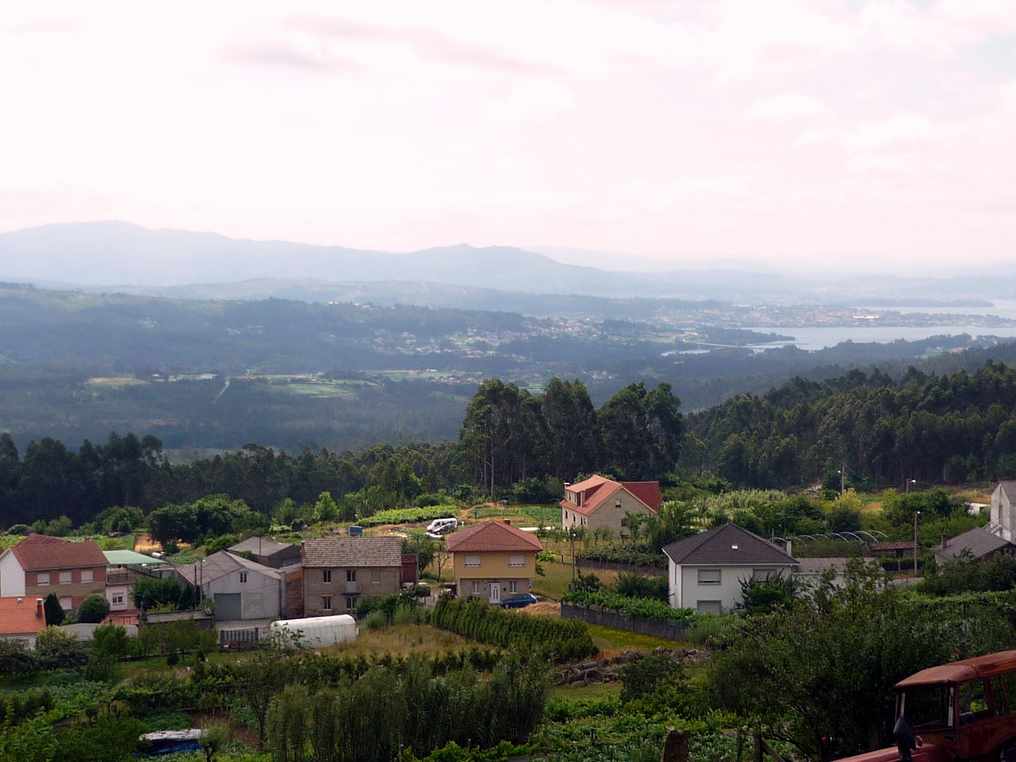 Vistas da ría de Arousa dende Moimenta, Macenda, Boiro